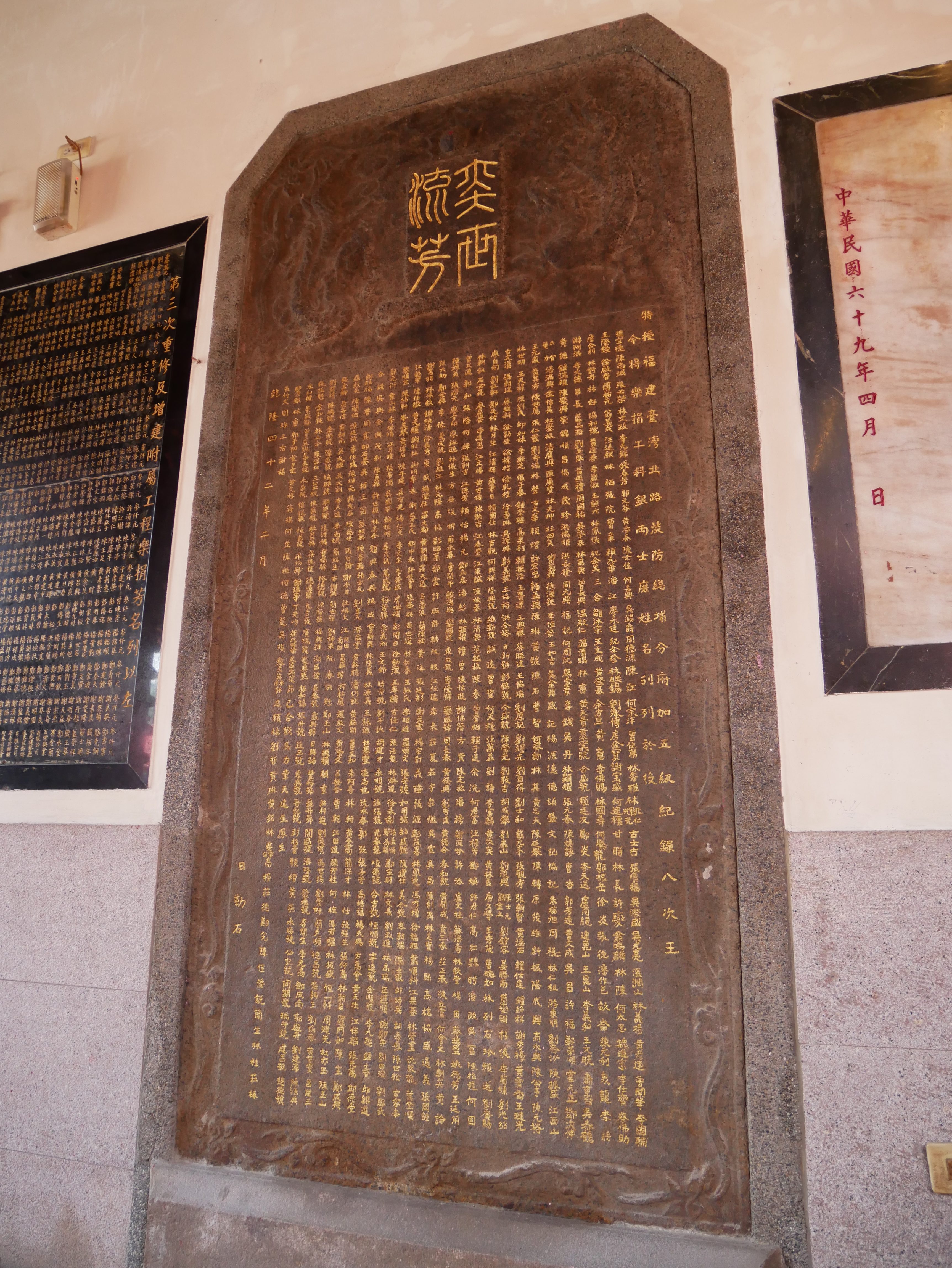 鼎建關帝廟捐題碑記（乾隆四十二年二月），新竹市東區南門聯里關帝里